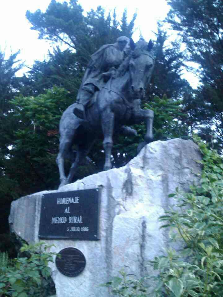 Monumento "Homenaje al médico rural", esculpida por el Dr. Ramón Ruiz Lloreda, en Potes (Cantabria - España). Inaugurada el 05/07/1986.